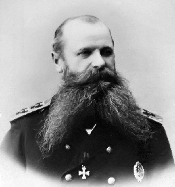 Степа́н О́сипович Мака́ров (27 декабря 1848 (8 января 1849), Николаев — 31 марта (13 апреля) 1904, близ Порт-Артура) — русский военно-морской деятель, океанограф, полярный исследователь, кораблестроитель, вице-адмирал (20 августа 1896). В 1895 году разработал русскую семафорную азбуку.